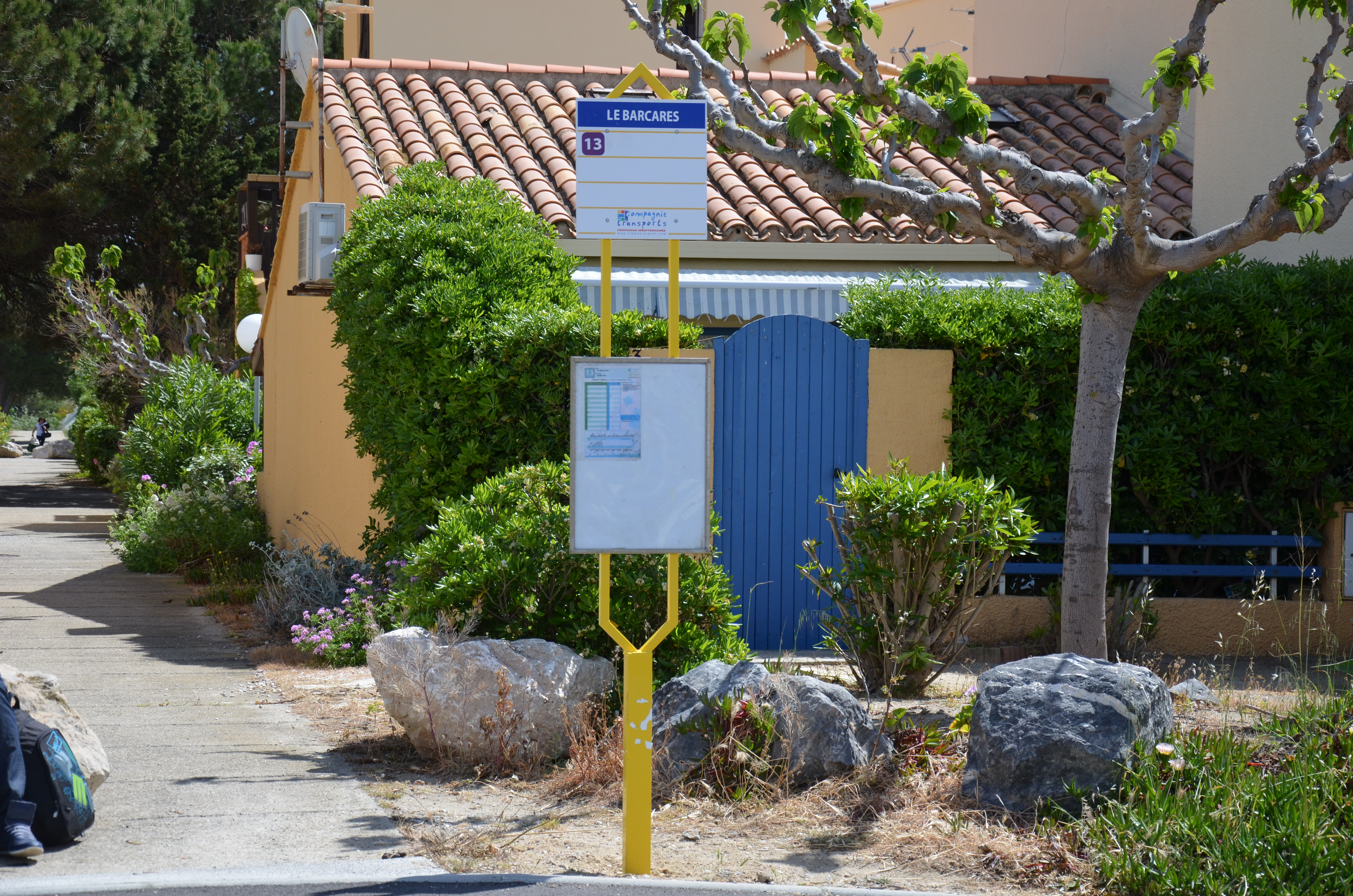 Arrêt de bus type du réseau CTPM de Perpignan. Ici, à l'arrêt terminus de la ligne 13 "Le Barcarès".